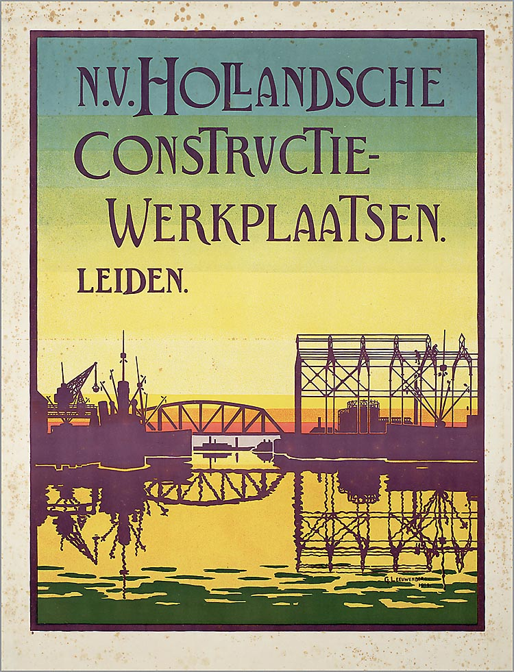 Affiche N.V. Hollandsche Constructiewerkplaatsen te Leiden. ontwerper G. Leeuwenberg, 1919, affiche 970 x 740 mm